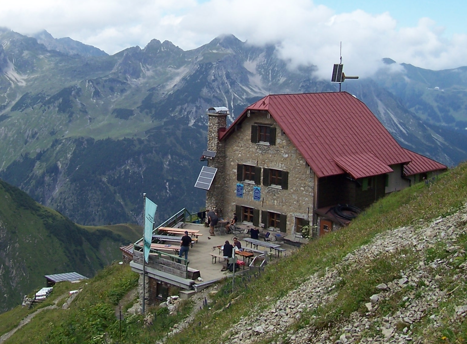 Das alte Waltenberger-Haus (bis 2015).